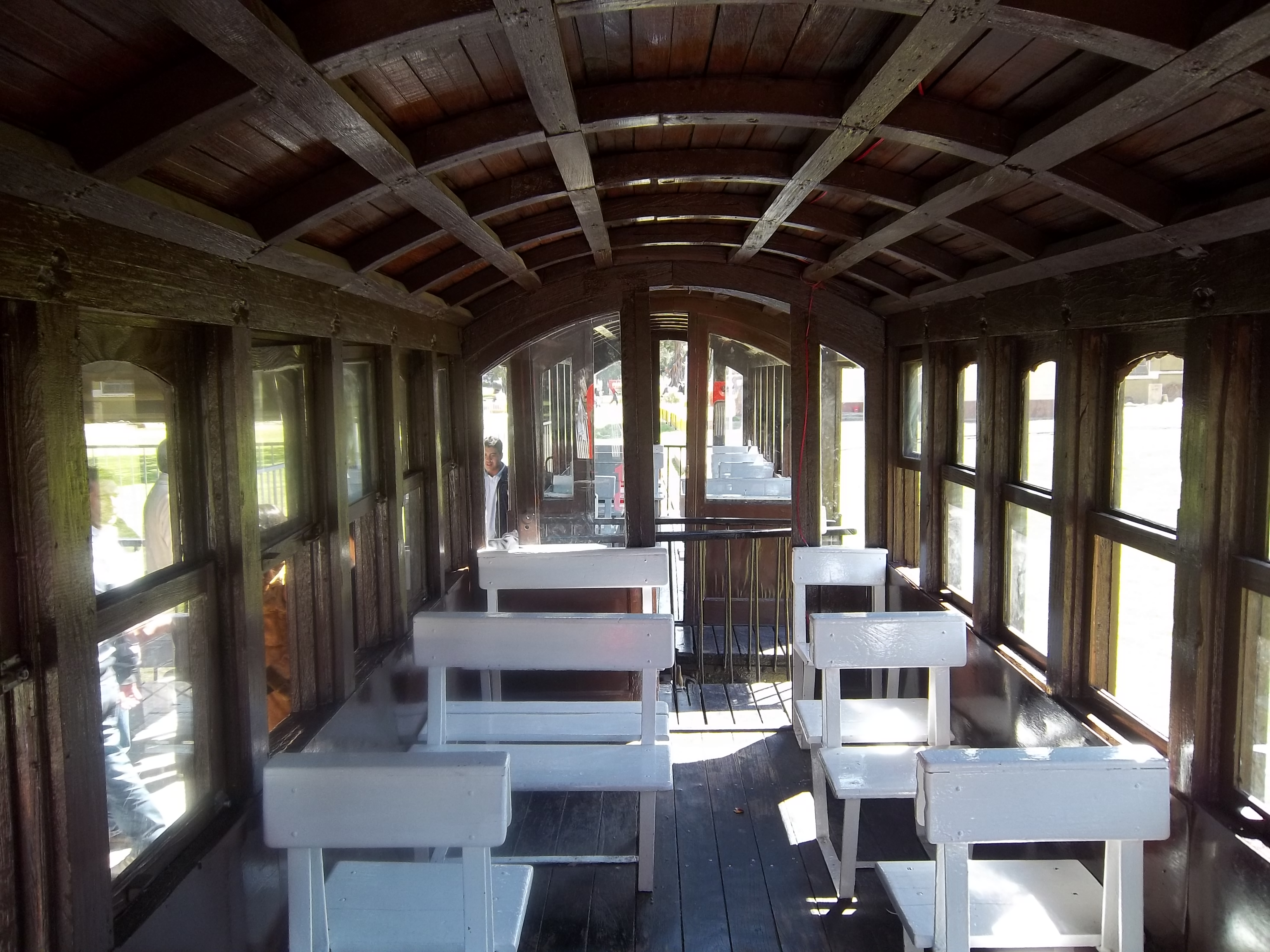 Interior del trencito de la República de los Niños en Manuel B. Gonnet, partido de La Plata, provincia de Buenos Aires, Argentina.